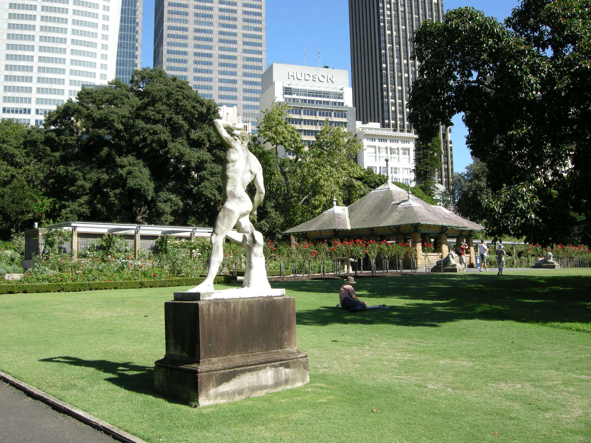 Royal Botanic Gardens, Sydney 11 lottatori di canova